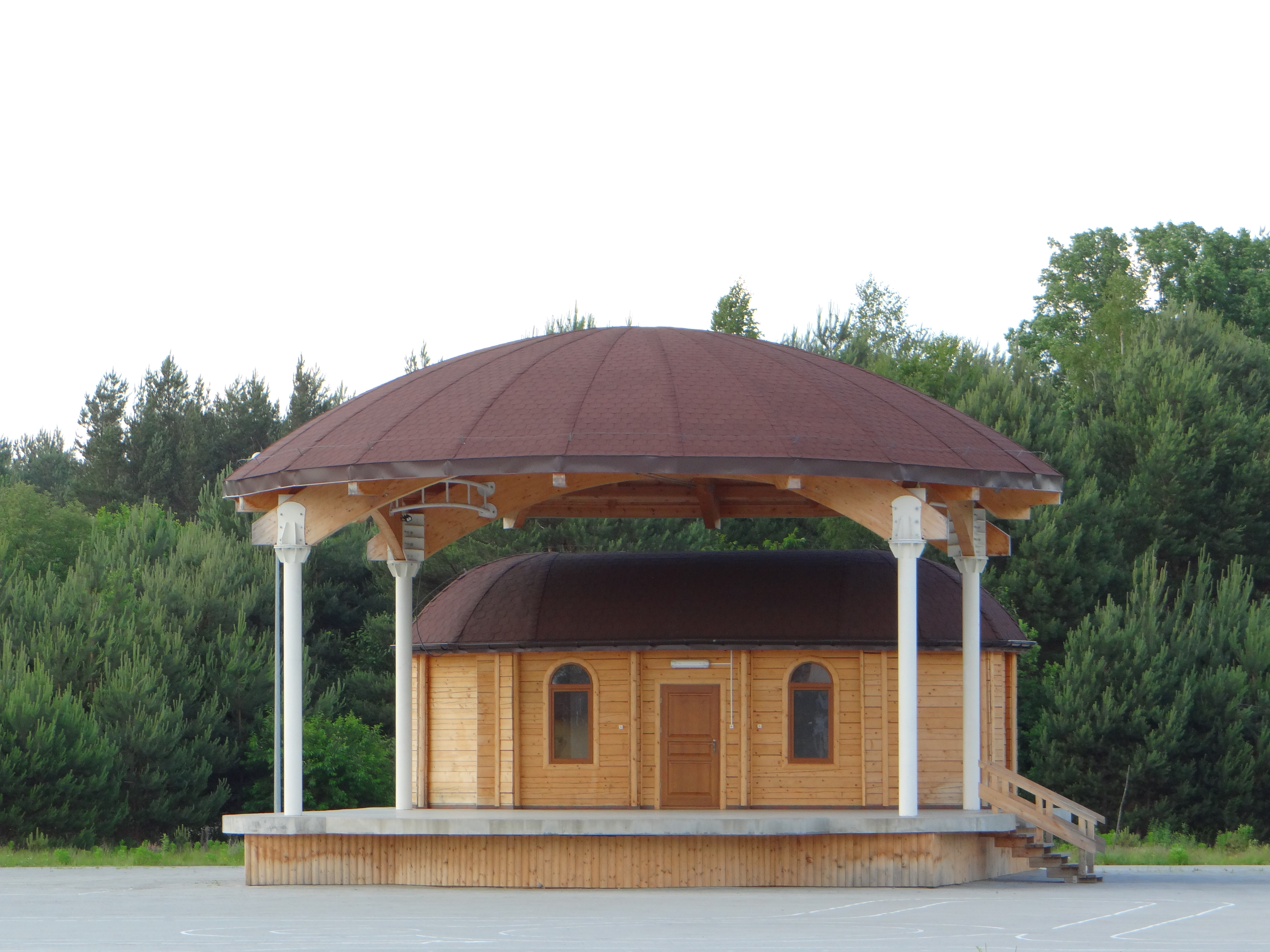 Scena plenerowa przy kompleksie sportowym.